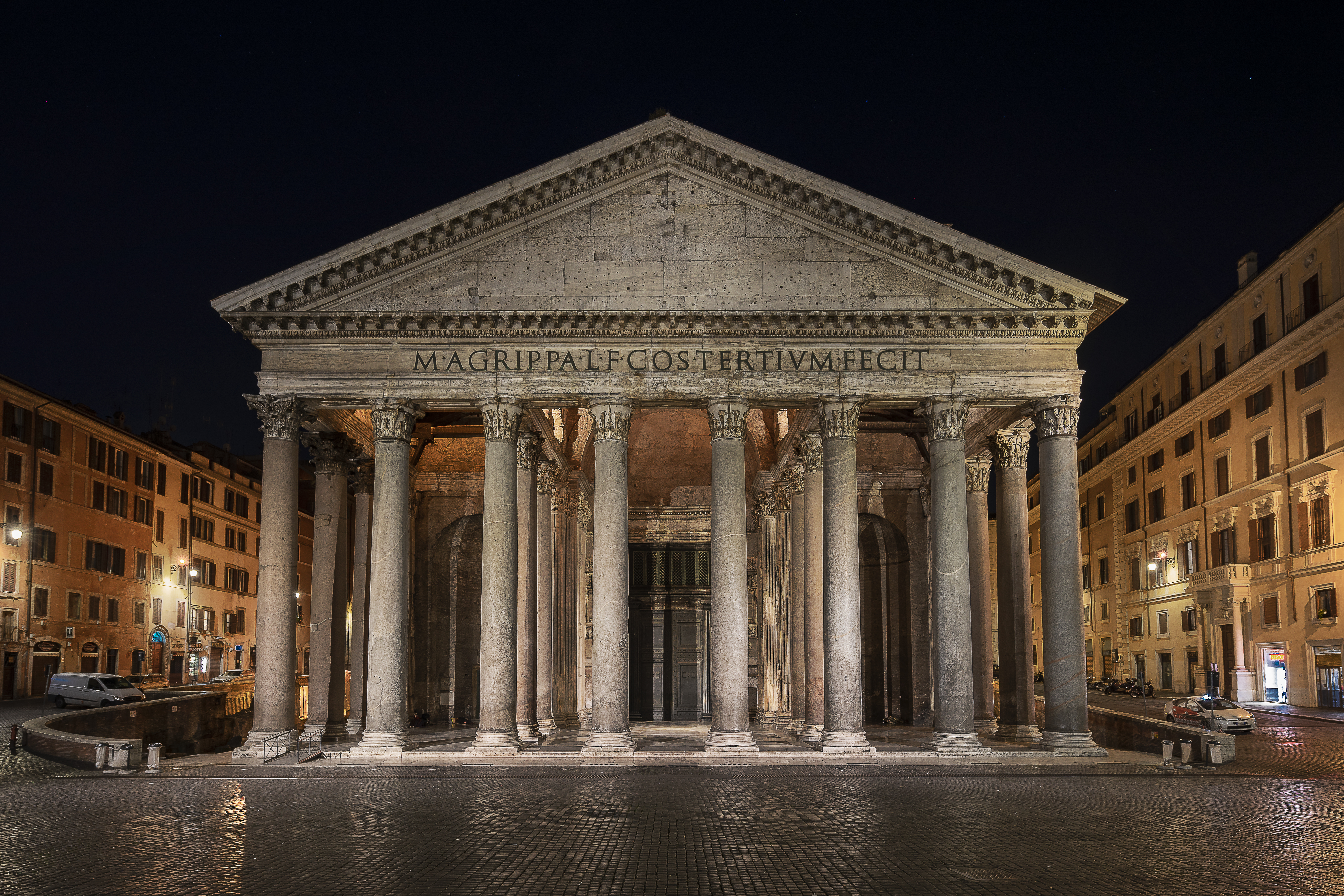 Patheon vista notturna